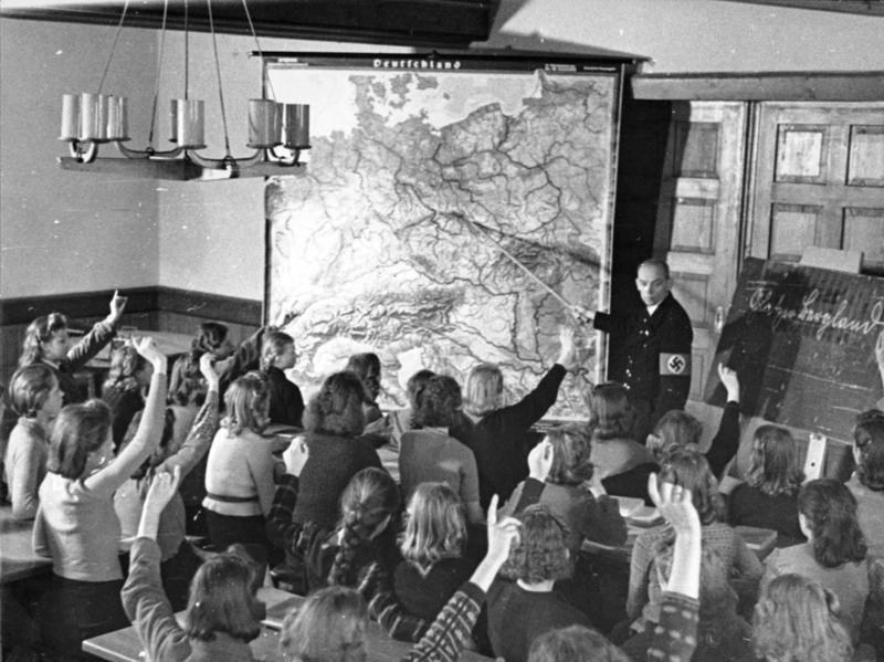 Schlesien, Berliner Kinder im KLV-Lager Scherl Bilderdienst: KLV-Lager Berliner Kinder, Hassitz bei Glatz Vortext siehe Bild 183-L16328 Geographiestunde in einem der Klassenräume. Fot. Schw[ahn] 1.11.40 [Herausgabedatum]